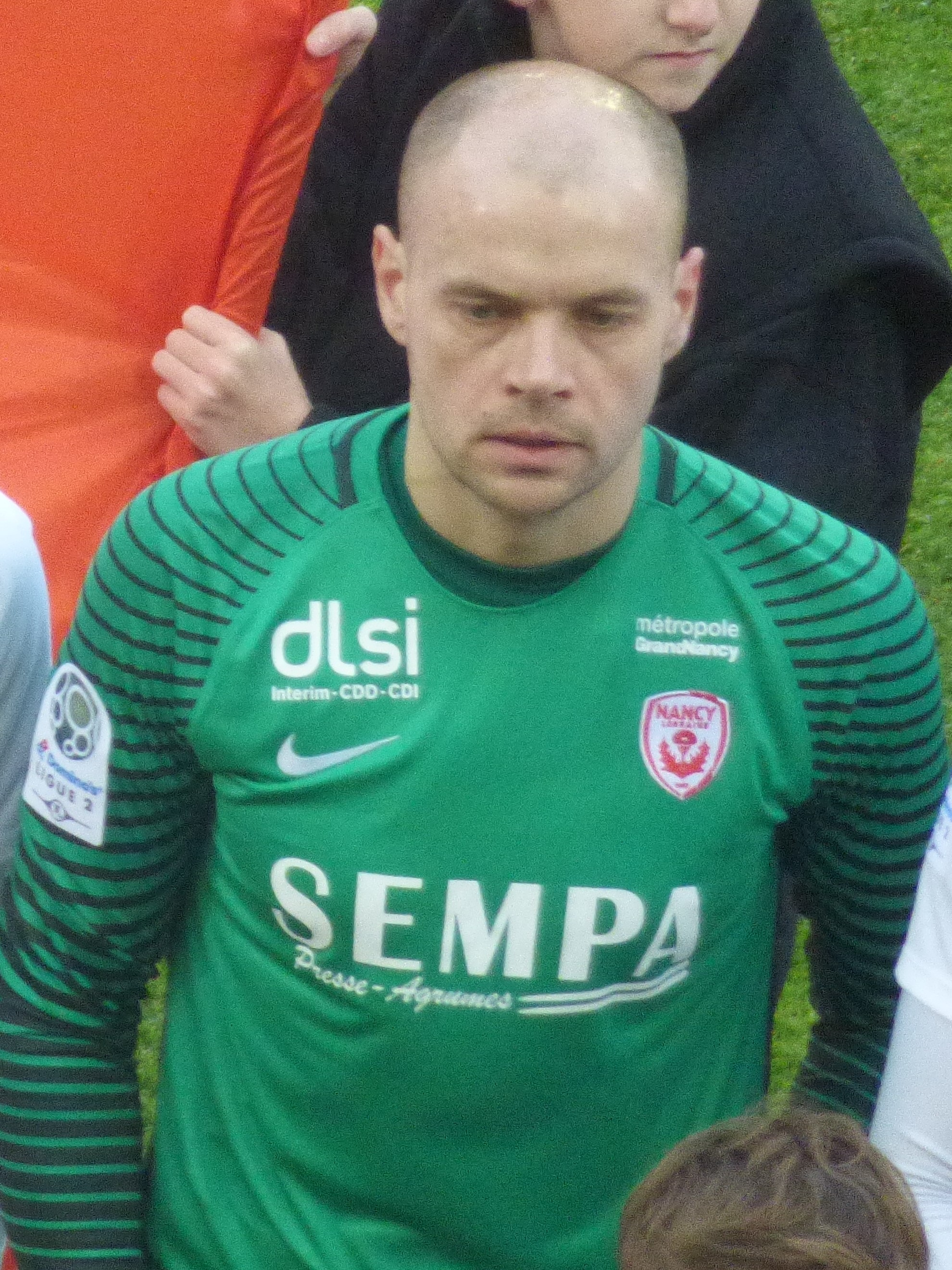 Sergey Chernik avant le match RC Lens / AS Nancy-Lorraine, comptant pour la vingt-et-unième journée du championnat de France de football de Ligue 2 2018-2019, le 19 janvier 2019, au Stade Bollaert-Delelis de Lens.